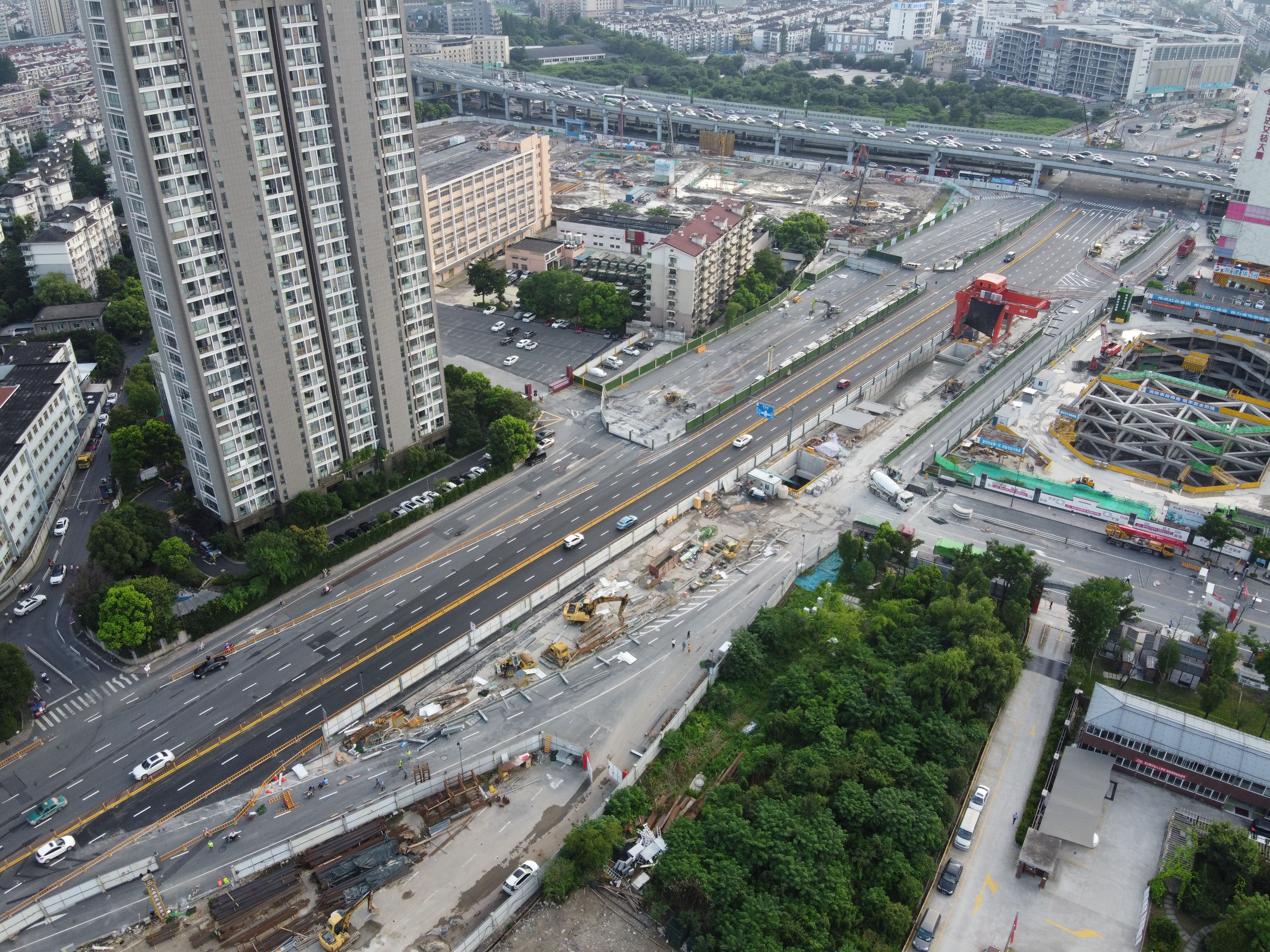 20200712四季青站工地